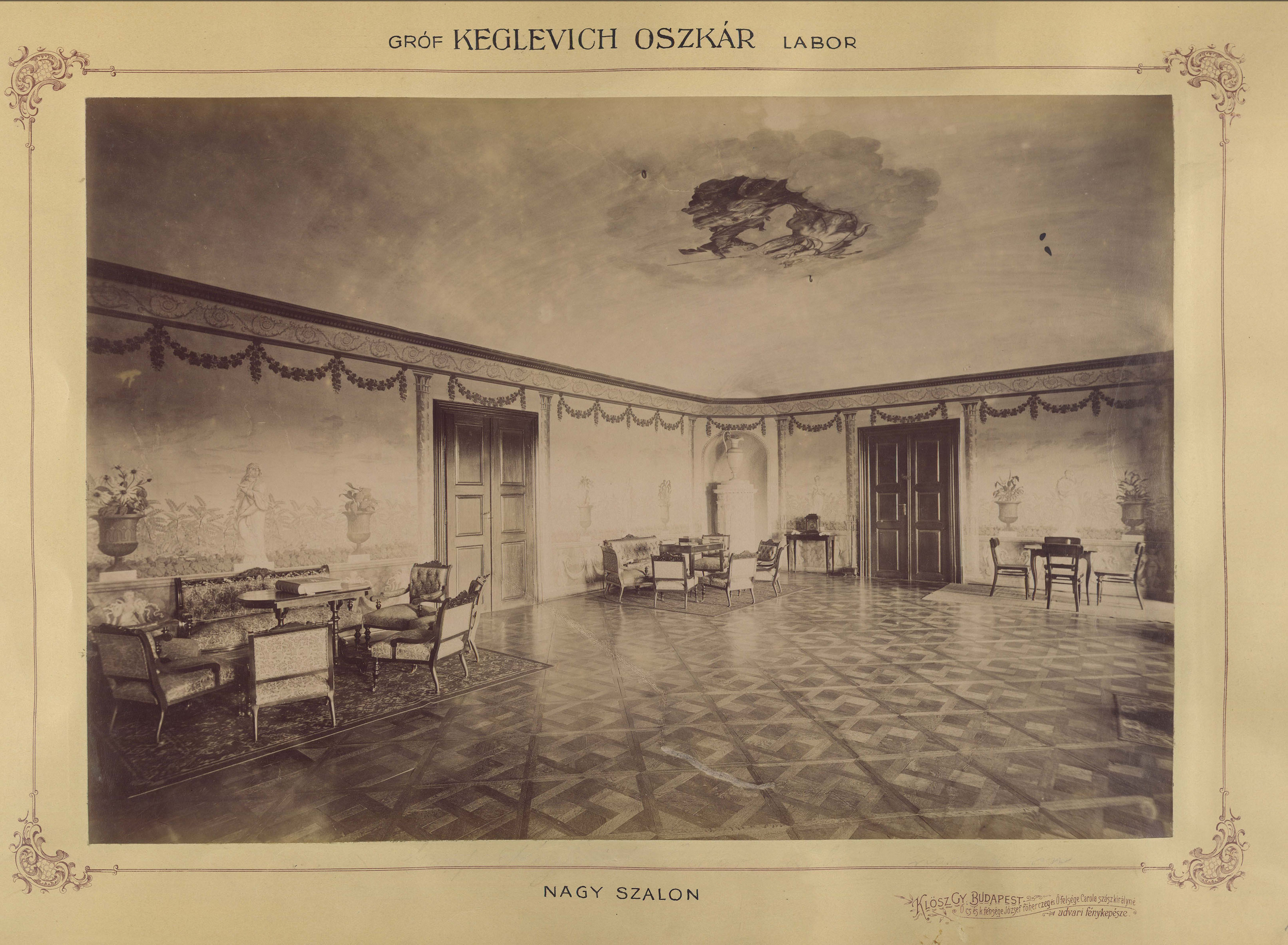 gróf Keglevich Oszkár, az Operaház egykori intendánsának kastélya, szalon. A felvétel 1895-1899 között készült. A kép forrását kérjük így adja meg: Fortepan / Budapest Főváros Levéltára. Levéltári jelzet: HU.BFL.XV.19.d.1.11.023 Location: Croatia, Lobor Tags: interior, mansion